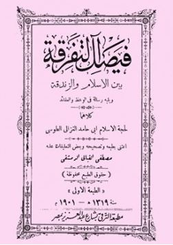 طبعة كتاب فيصل التفرقة بين الإسلام والزندقة، اعتنى بها مصطفى القباني الدمشقي وطبعت في مطبعة الترقي بشارع عبد العزيز بمصر سنة ١٣١٩ هـ / ١٩٠١ م